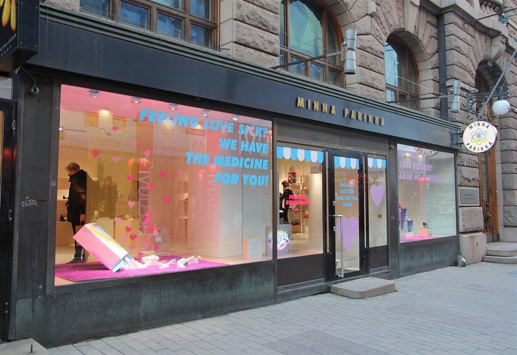 Suomalaisen kenkäsuunnittelija Minna Parikan kenkämyymälä Helsingin Aleksanterinkadulla.